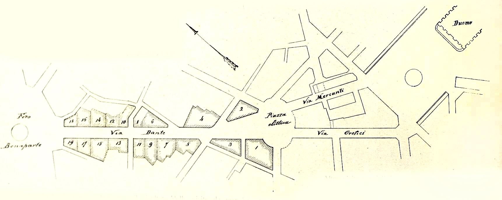 Pianta della Via Dante con indicazione delle nuove fabbriche, in L'Edilizia Moderna, aprile 1893, tagliato